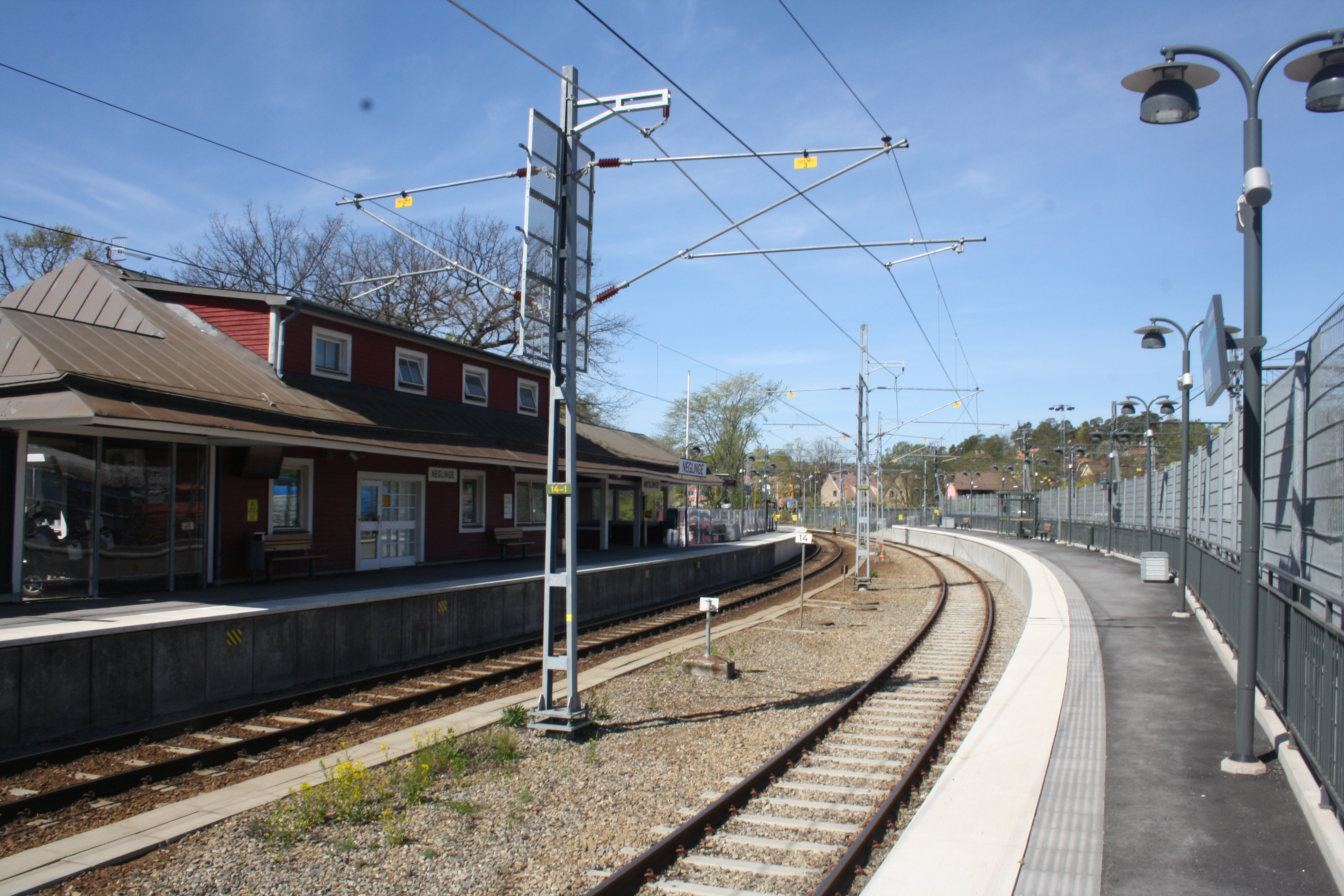 Neglinge